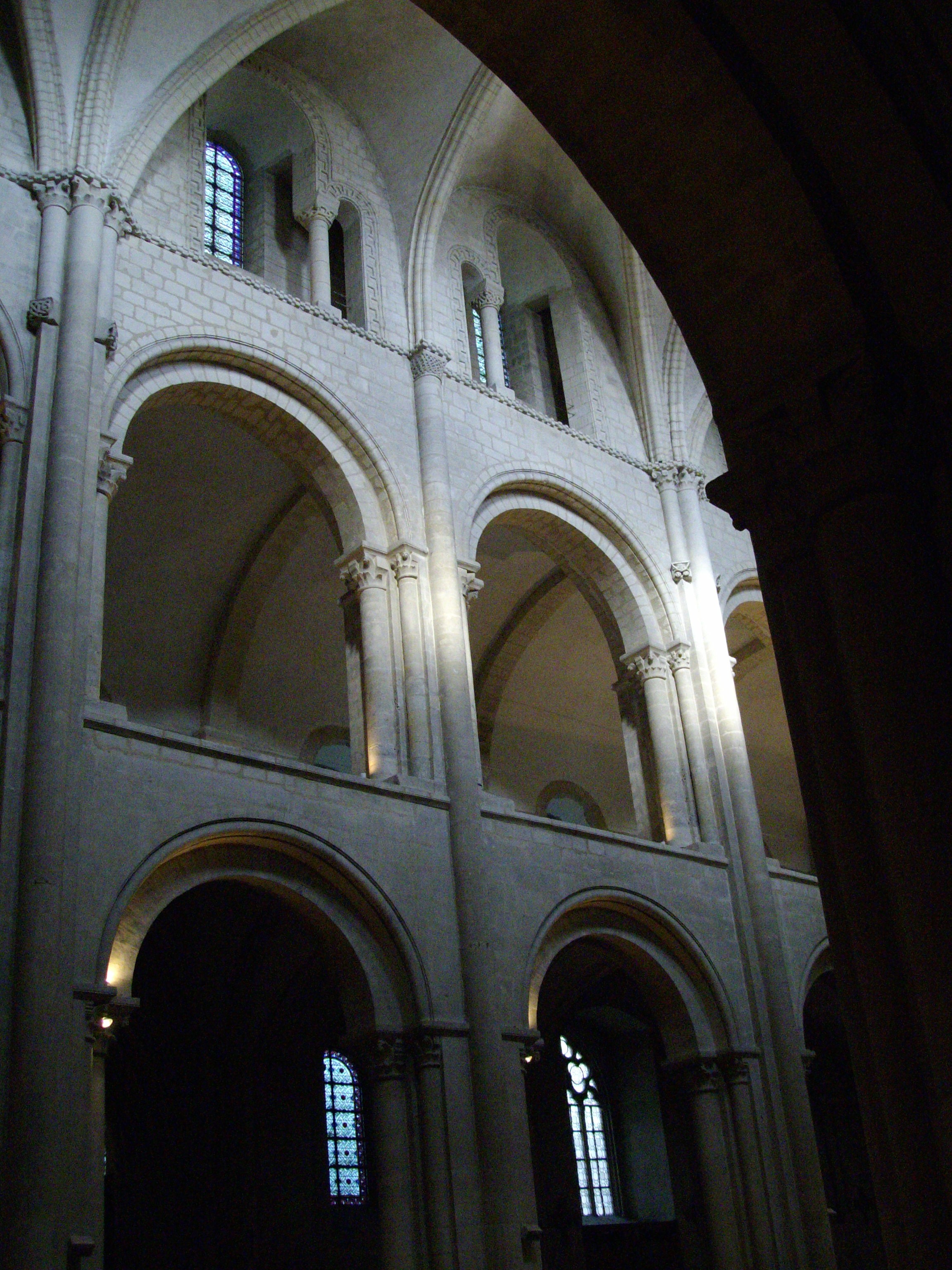 nef de l'église Saint-Étienne de l'ancienne abbaye aux Hommes de Caen (Calvados, Basse-Normandie).